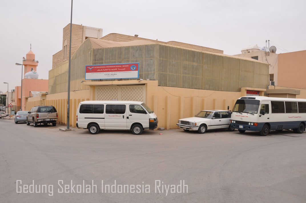 Gedung SIR